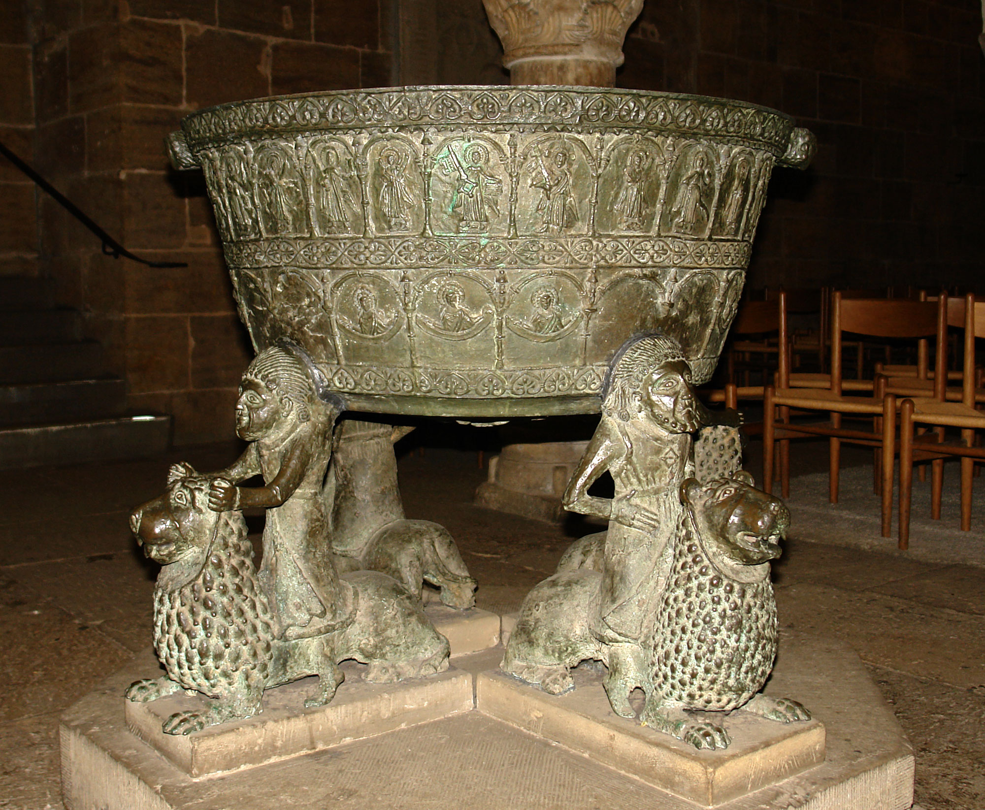 Bremer St. Petri Dom: Taufbecken (um 1220) in der Westkrypta. Ein Meisterwerk spätromanischer Bronzegießkunst, das zu den prächtigsten und ältesten dieser Art zählt. Die Bedeutung der vier auf Löwen reitenden Figuren ist nicht geklärt. In den oberen Rundbögen sind 26 Figuren dargestellt, in den unteren 12 Halbfiguren. (Qu.: Der Dom zu Bremen, ISBN 3-7845-4231-X)